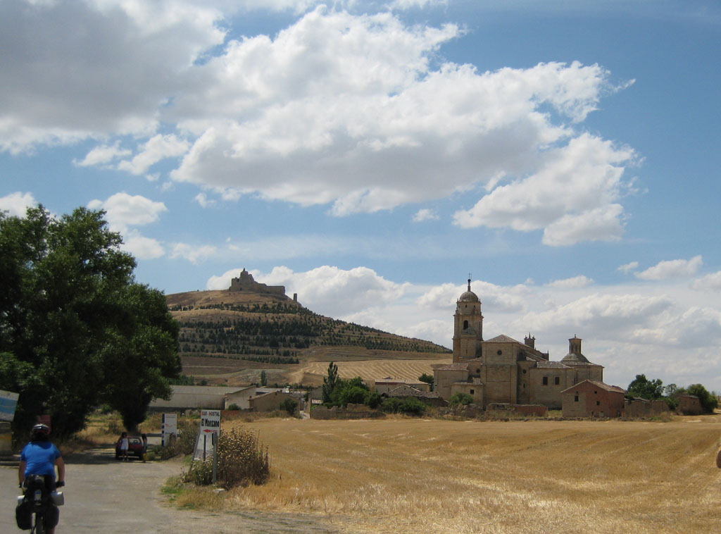 Castrojeriz mit Blick auf die Kirche Santa Maria del Manzano und die Burgruine